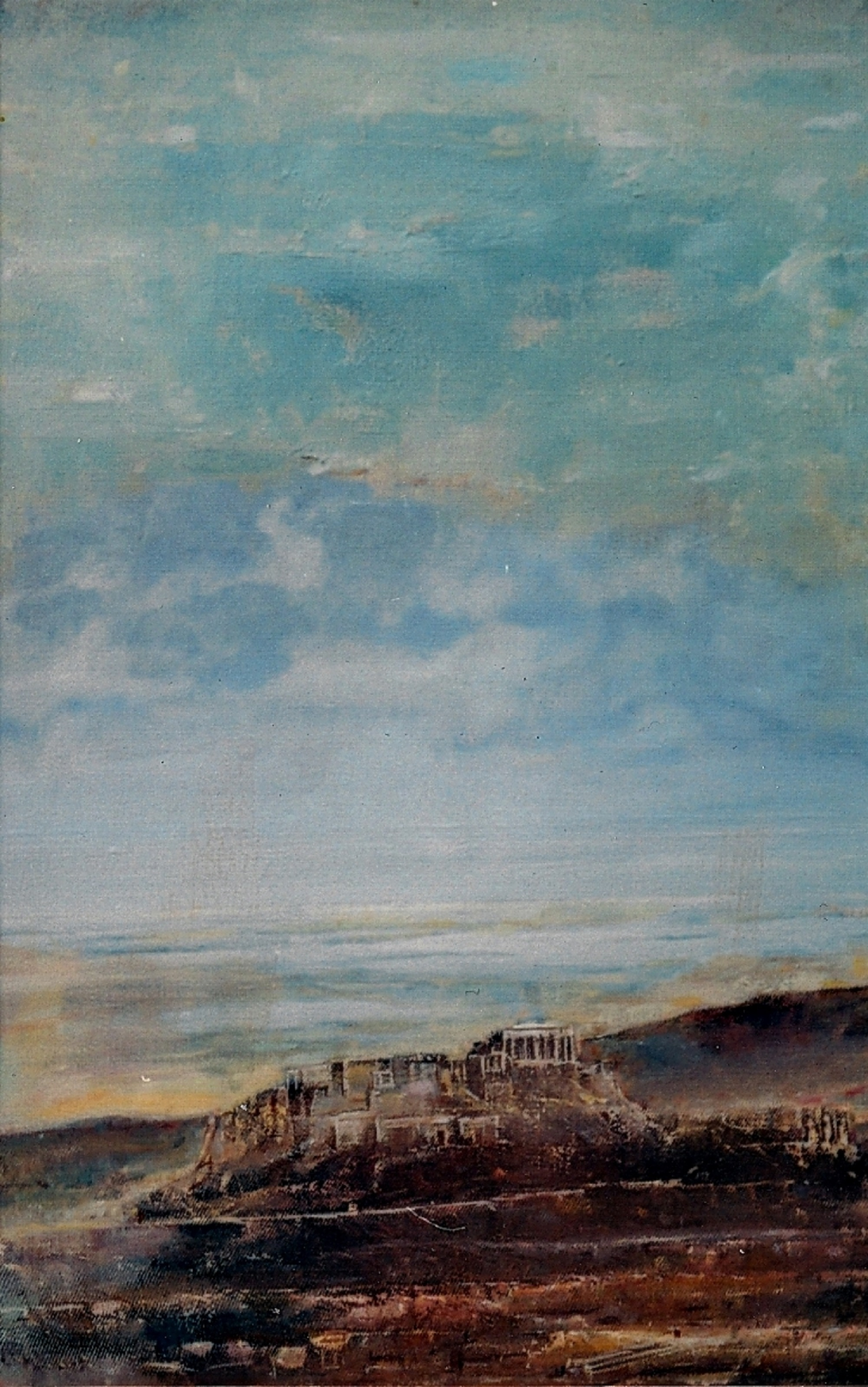 OIL ON CANVAS, 35X70, 2008